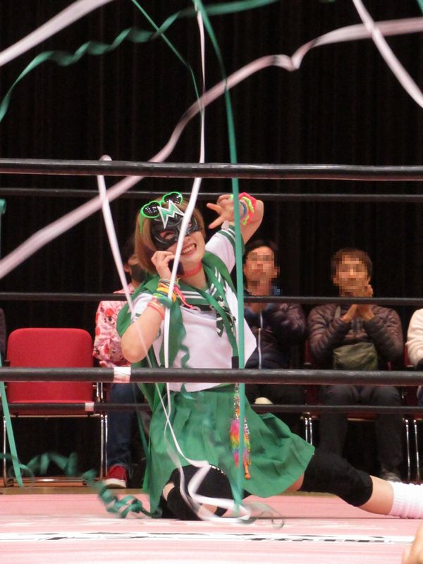 2020年大阪大会